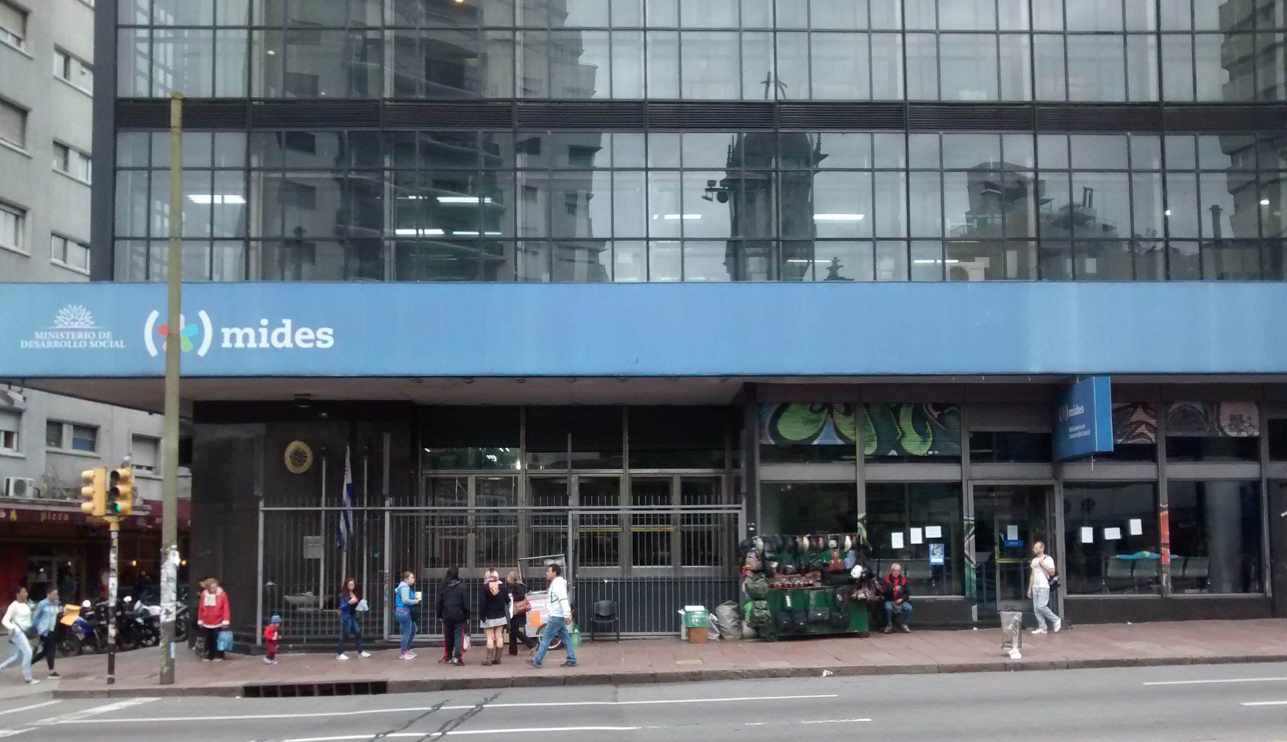 Sede del Ministerio de Desarrollo Social de Uruguay en Montevideo.